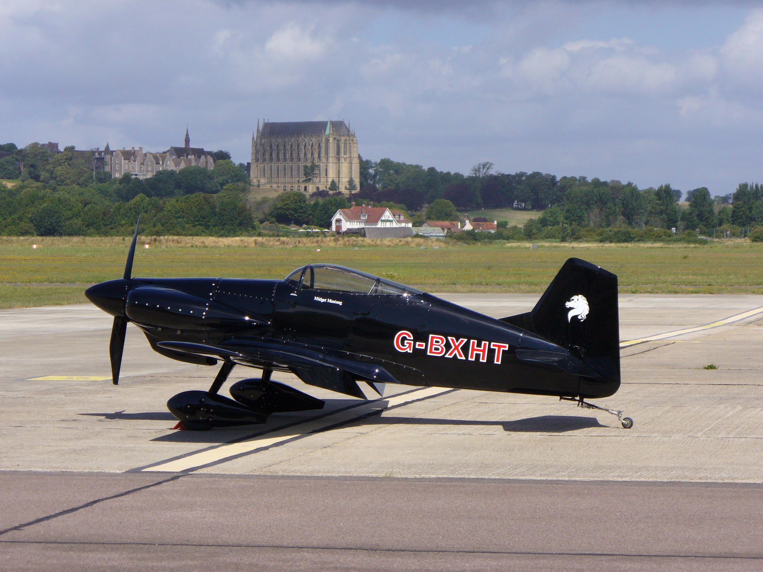 Long M.1A Midget Mustang